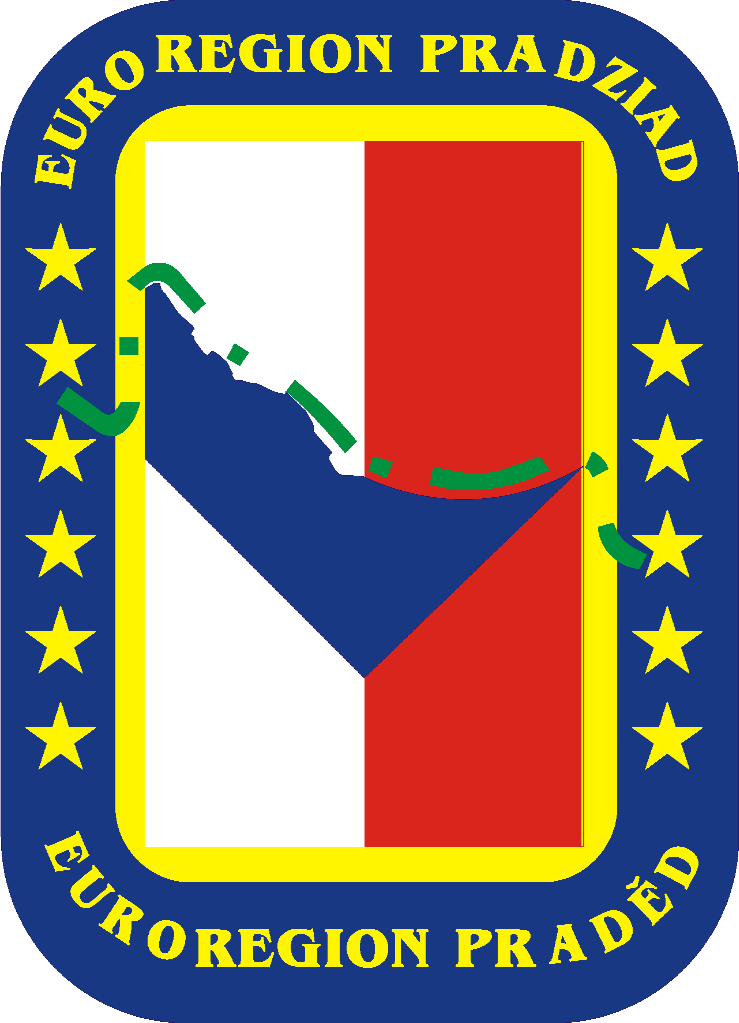 Logo Euroregionu Pradziad